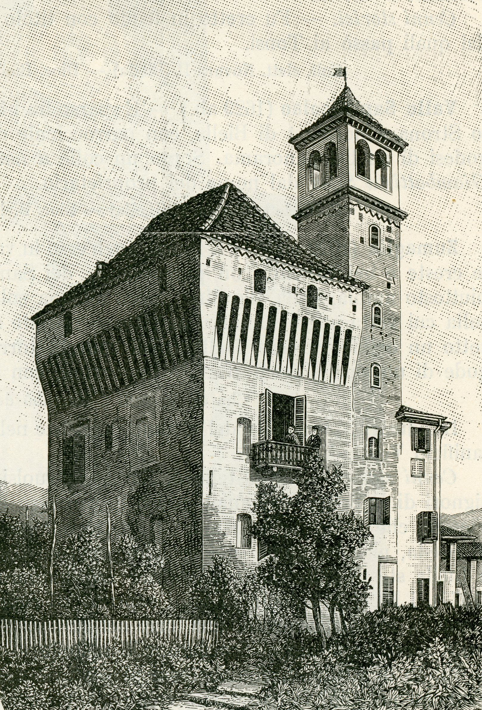 Castello di Ternengo, (xilografia di Barberis).